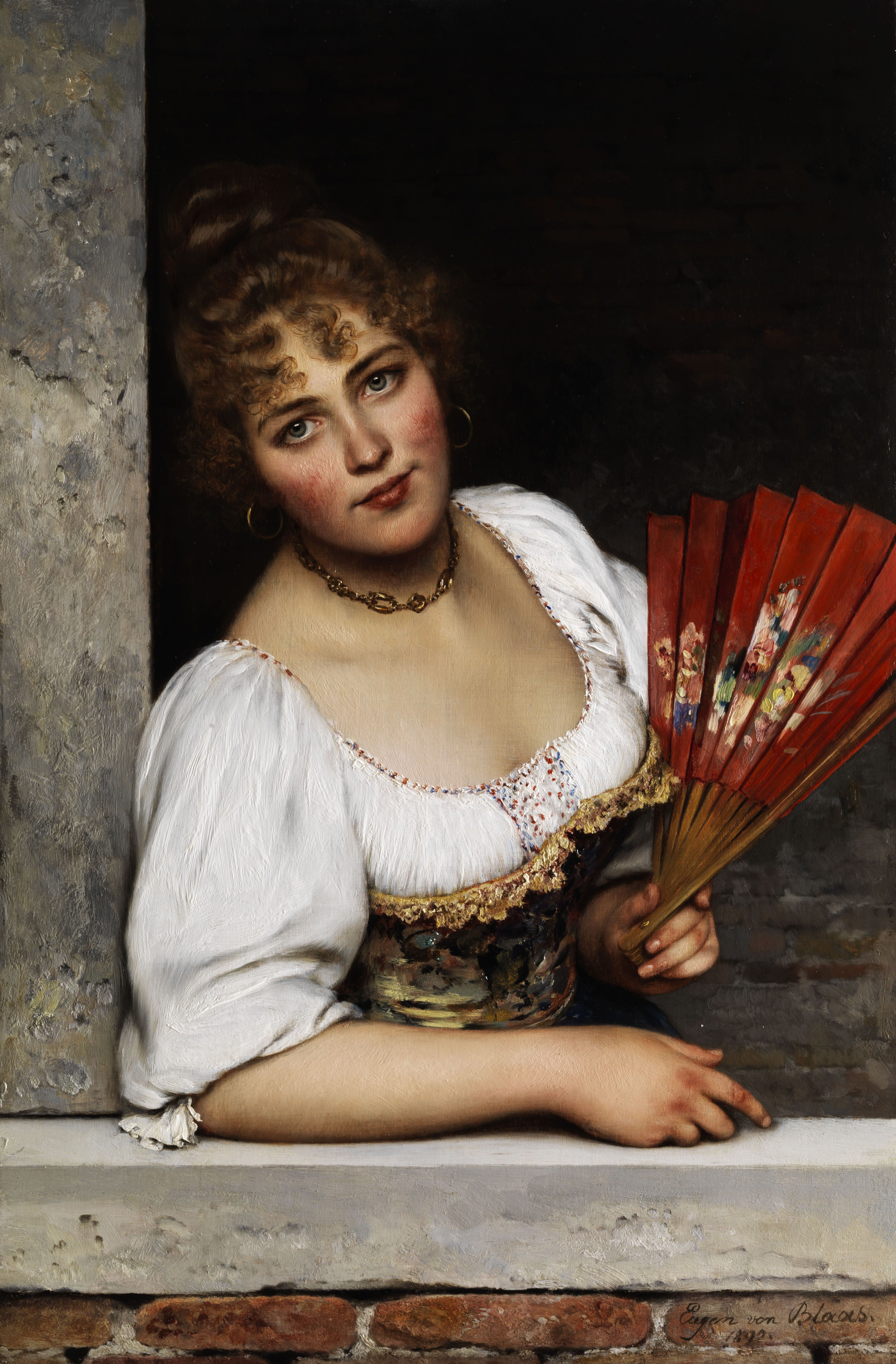 Der rote Fächertitle QS:P1476,de:"Der rote Fächer" label QS:Lde,"Der rote Fächer"